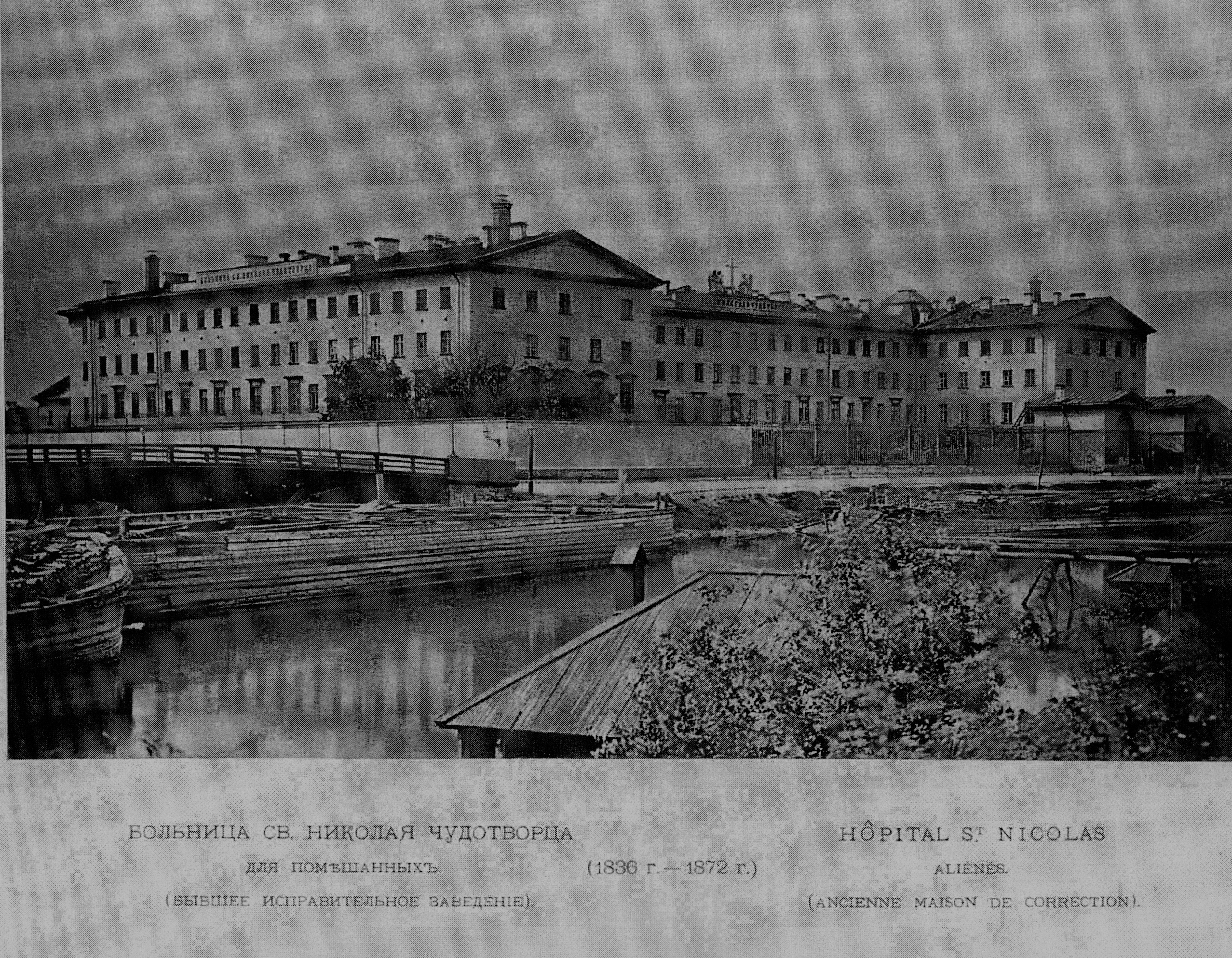 Иллюстрация изобржающая больницу св. Николая Чудотворца в 1878 году